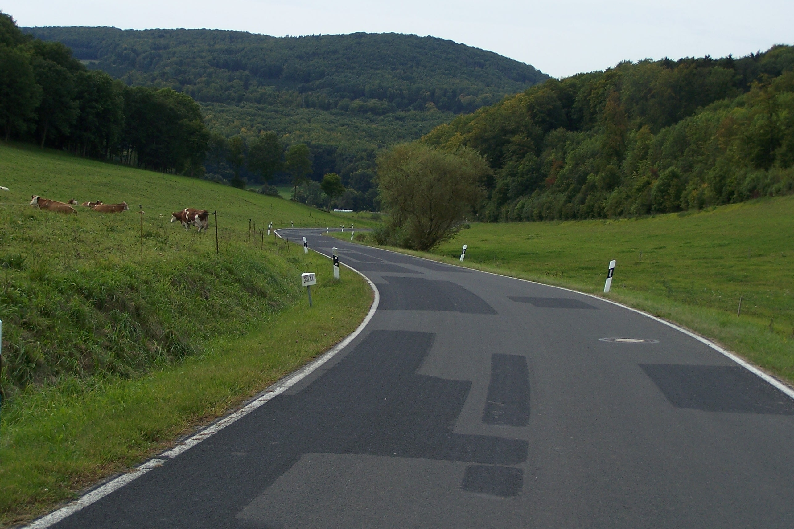 Gerstengrund